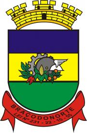 brasão de Braço do Norte